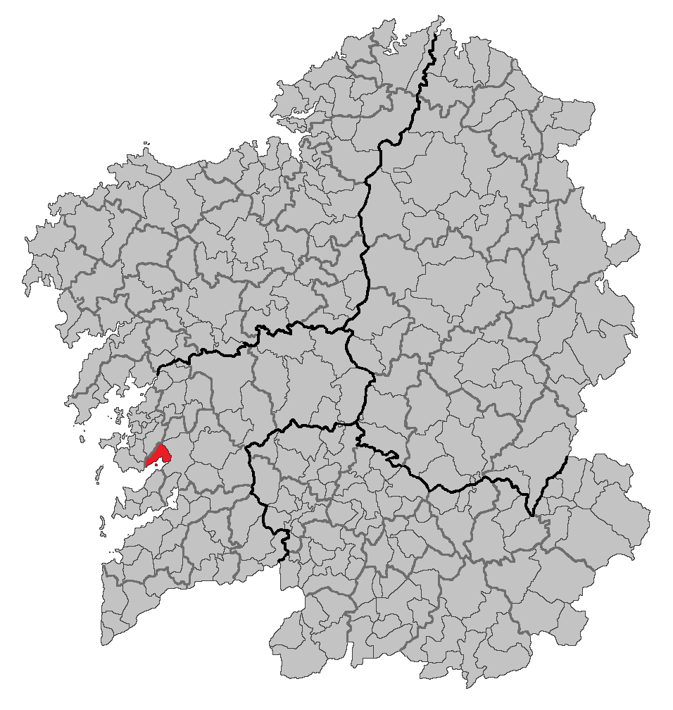 Mapa coa localización do concello de Poio.